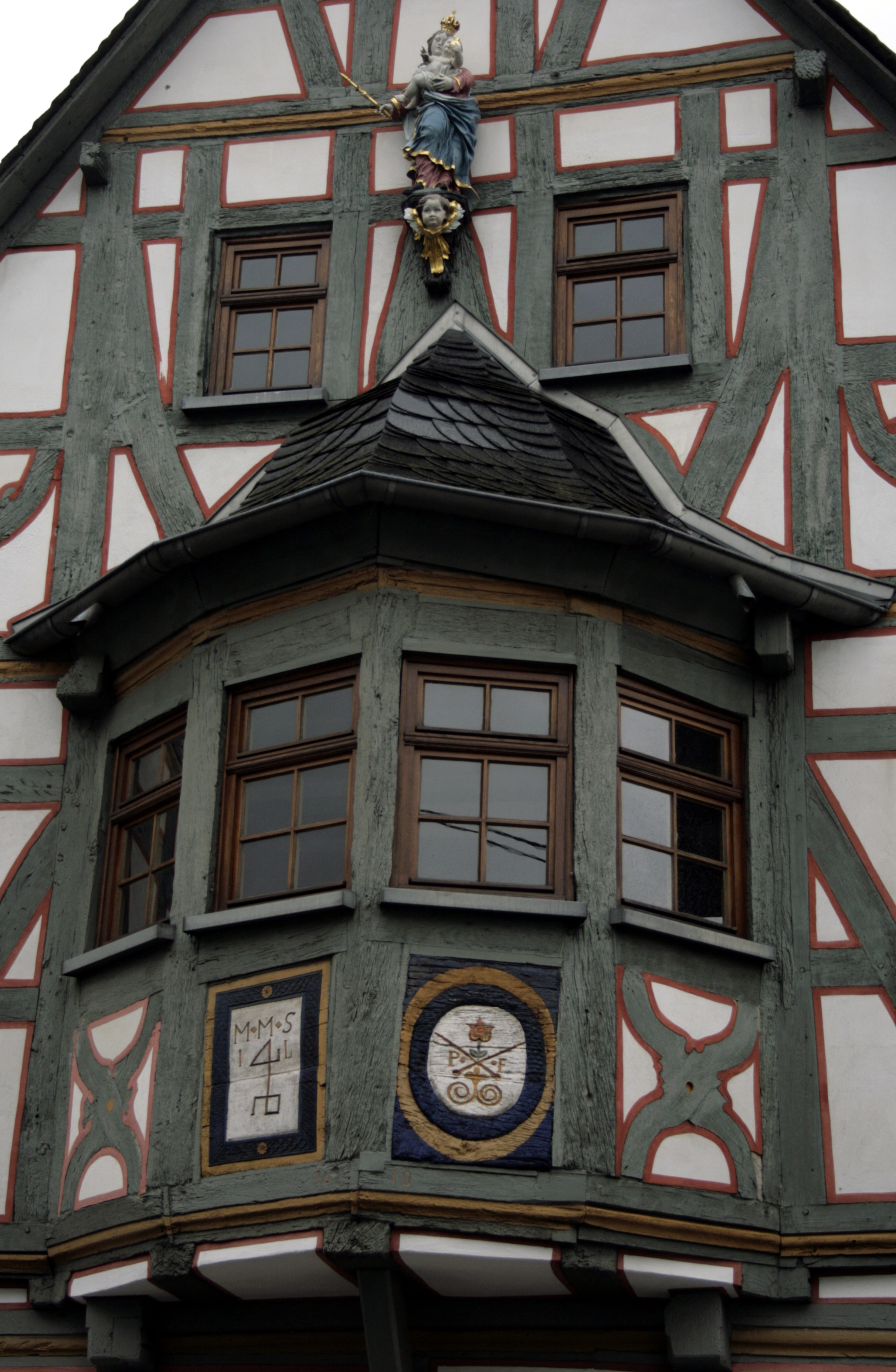 Erker am Haus Loer in Elz, Deutschland